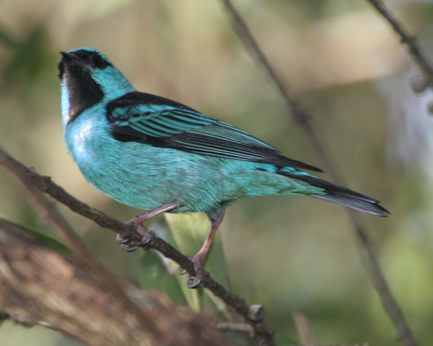 060403 blue dacnis b m IG.jpg